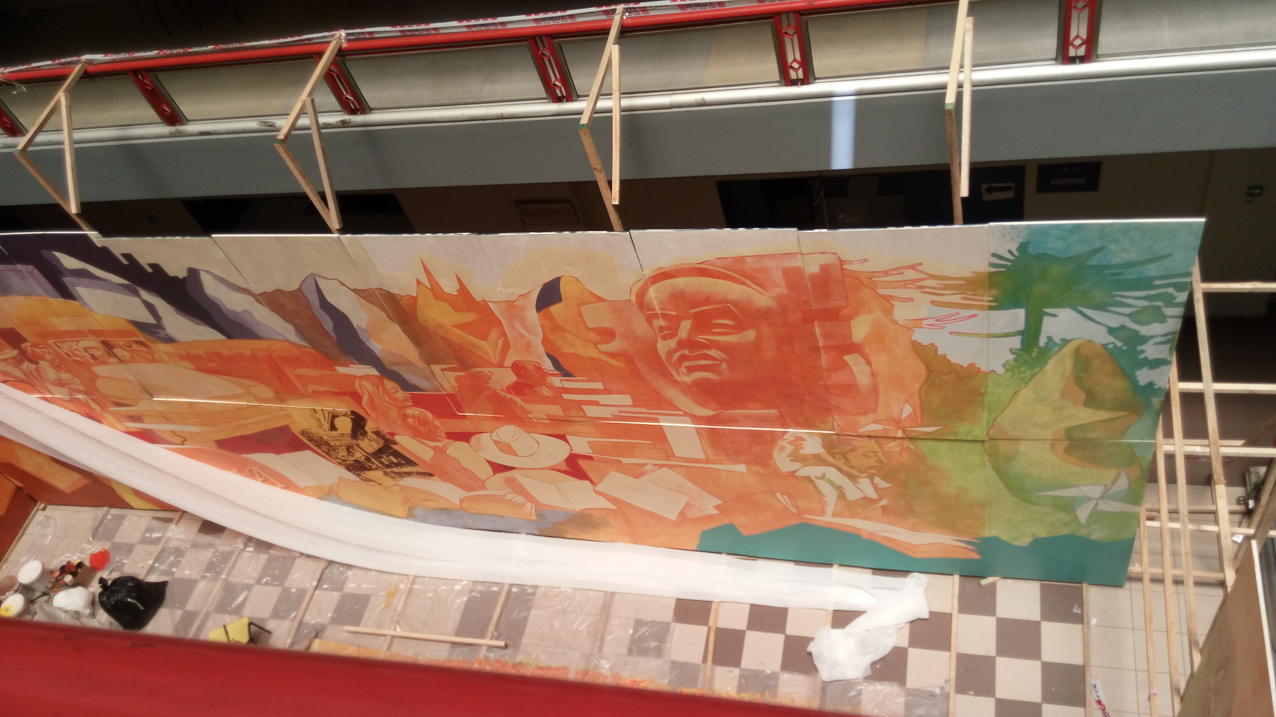 Mural Estación Parque Almagro en construcción ubicado en dependencias de la Facultad de Ingeniería y Arquitectura de la Universidad Central de Chile